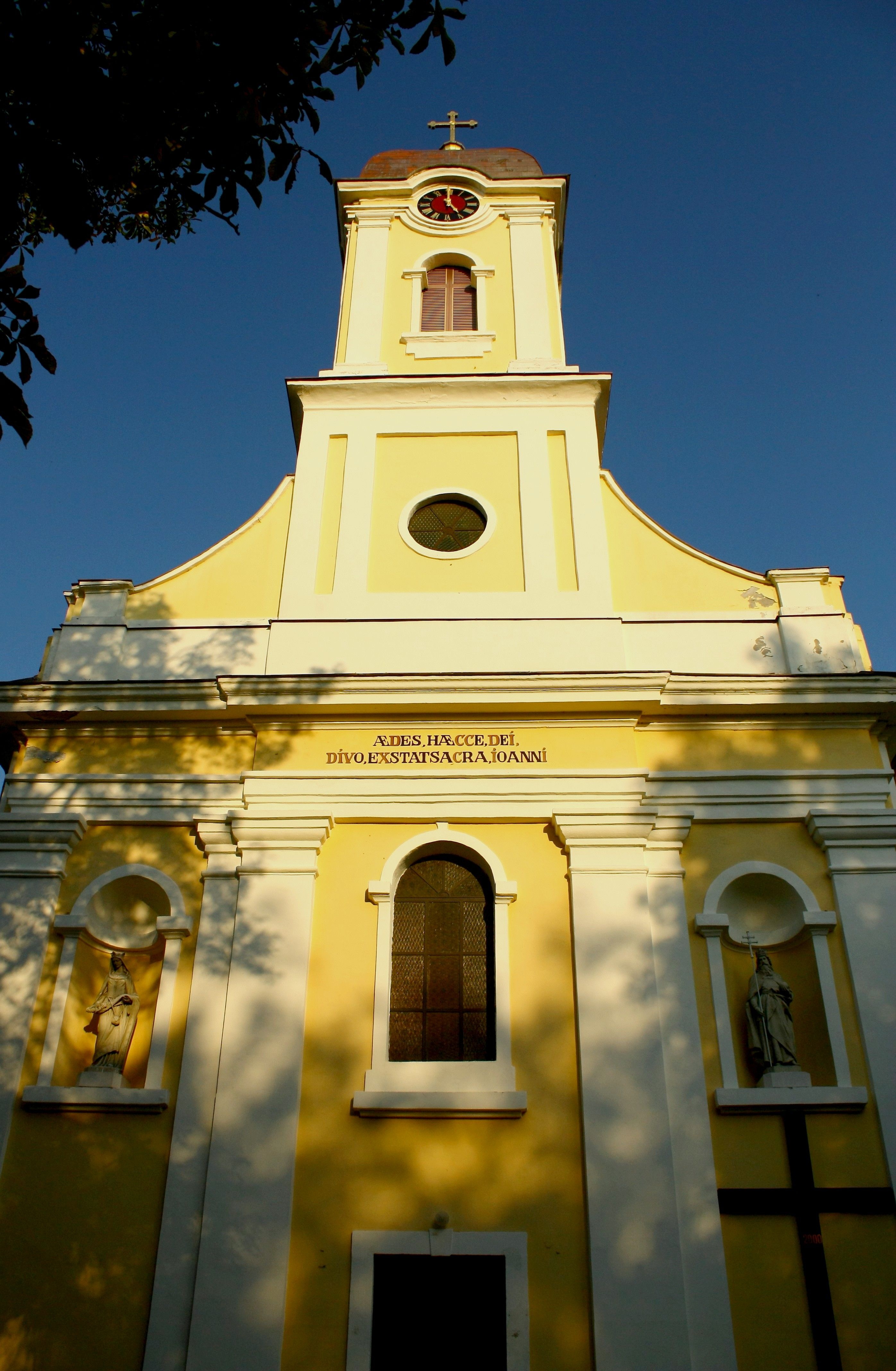 Krisztus király R.k. templom (Barcs, Hősök tere 3.) This is a photo of a monument in Hungary. Identifier: 7805